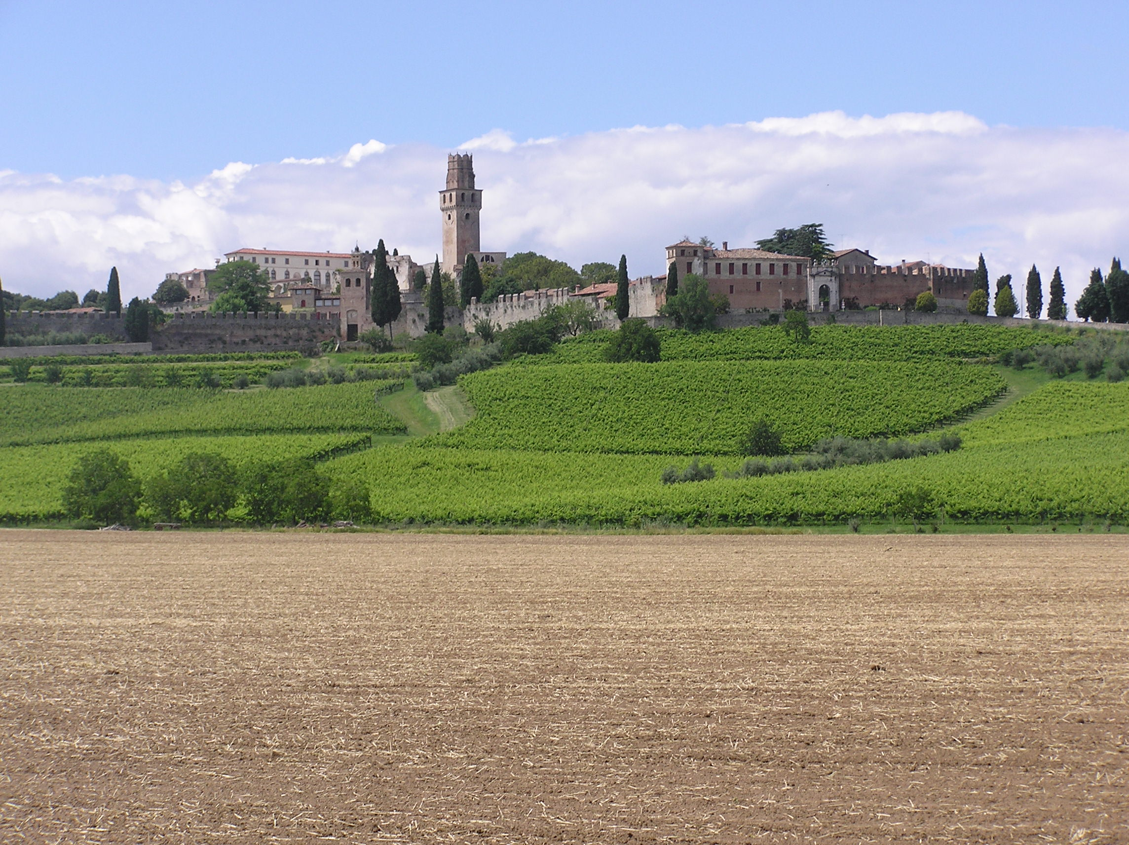 Foto scattata dal lato sud del Castello di San Salvatore, Susegana.